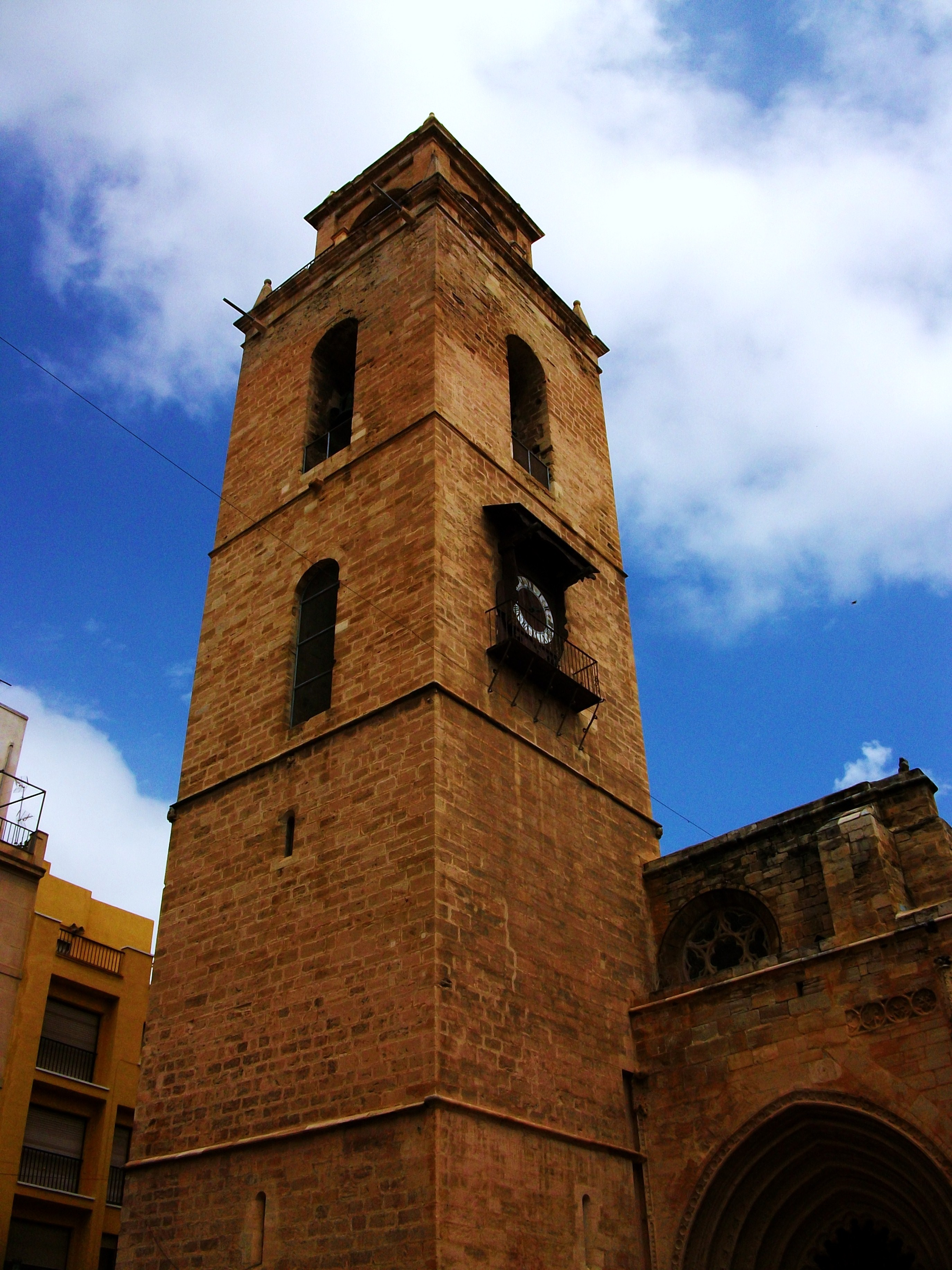 Campanar de la catedral d'Oriola.